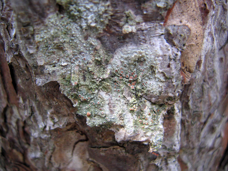 Lišaj sa Zlatibora